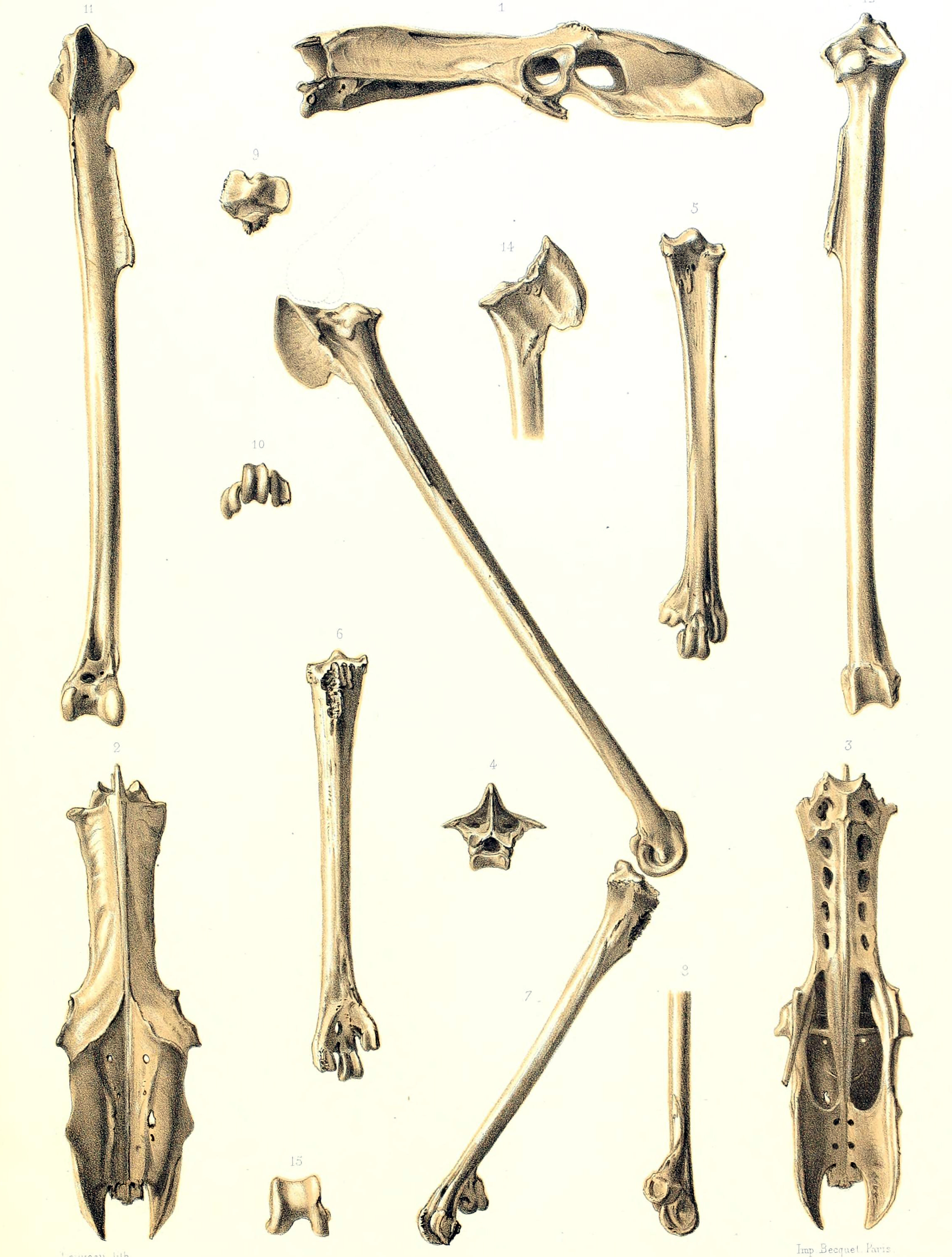 First described bones of Fulica newtoni. From Recherches sur la faune ornithologique éteinte des iles Mascareignes et de Madagascar Published by G. Masson in Paris, France, 1866.